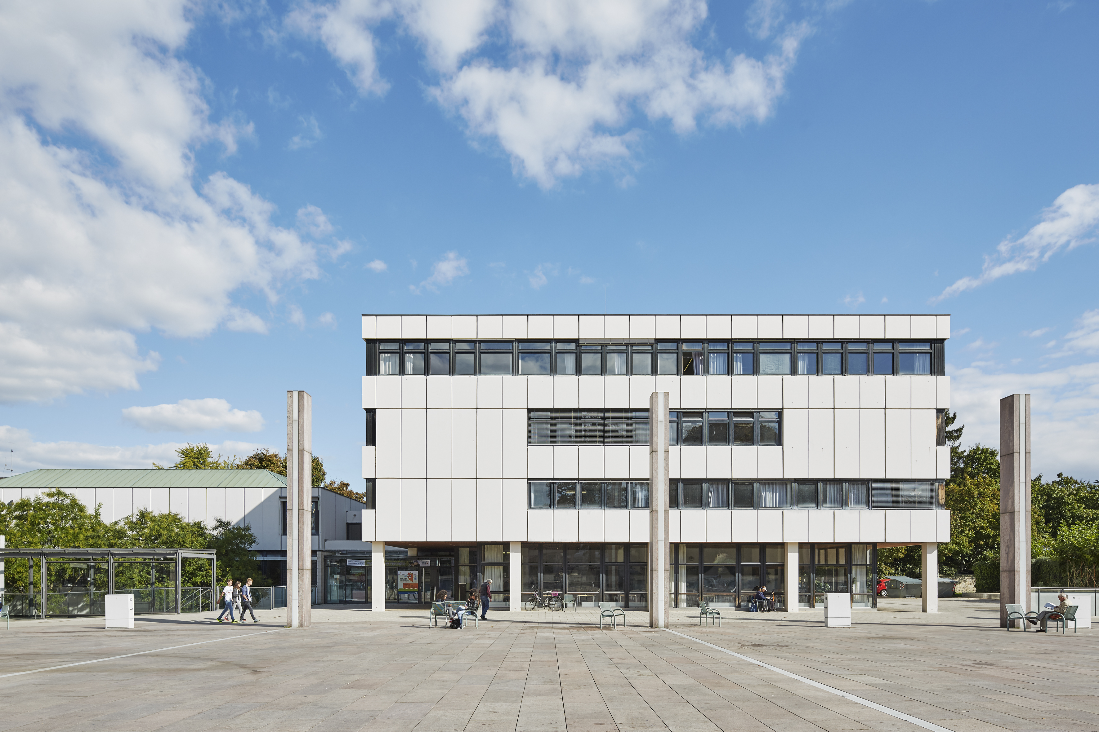 Kulturzentrum mit Stadtbibliothek am Rathaushof Ludwigsburg.